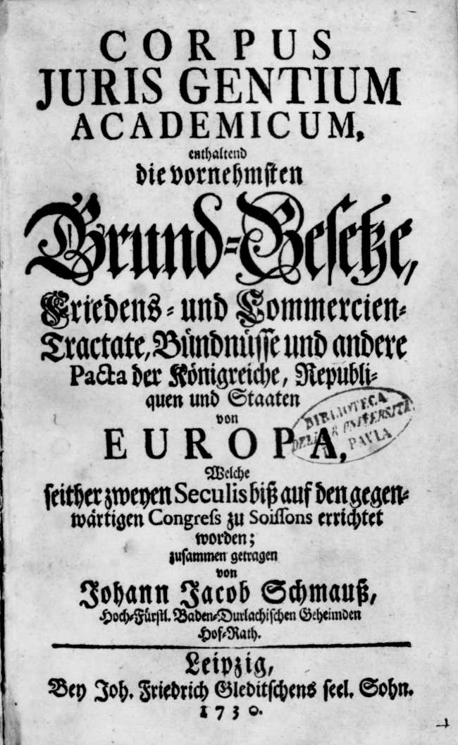 Frontespizio